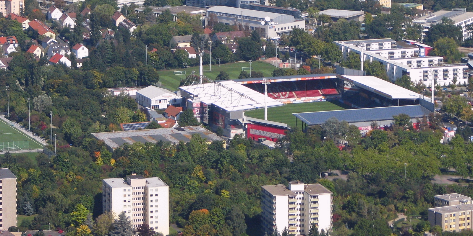 Mainzer Sportstätten nahe der Universität Mainz: Fußballstadion am Bruchweg (Mitte) und Eissporthalle (links)